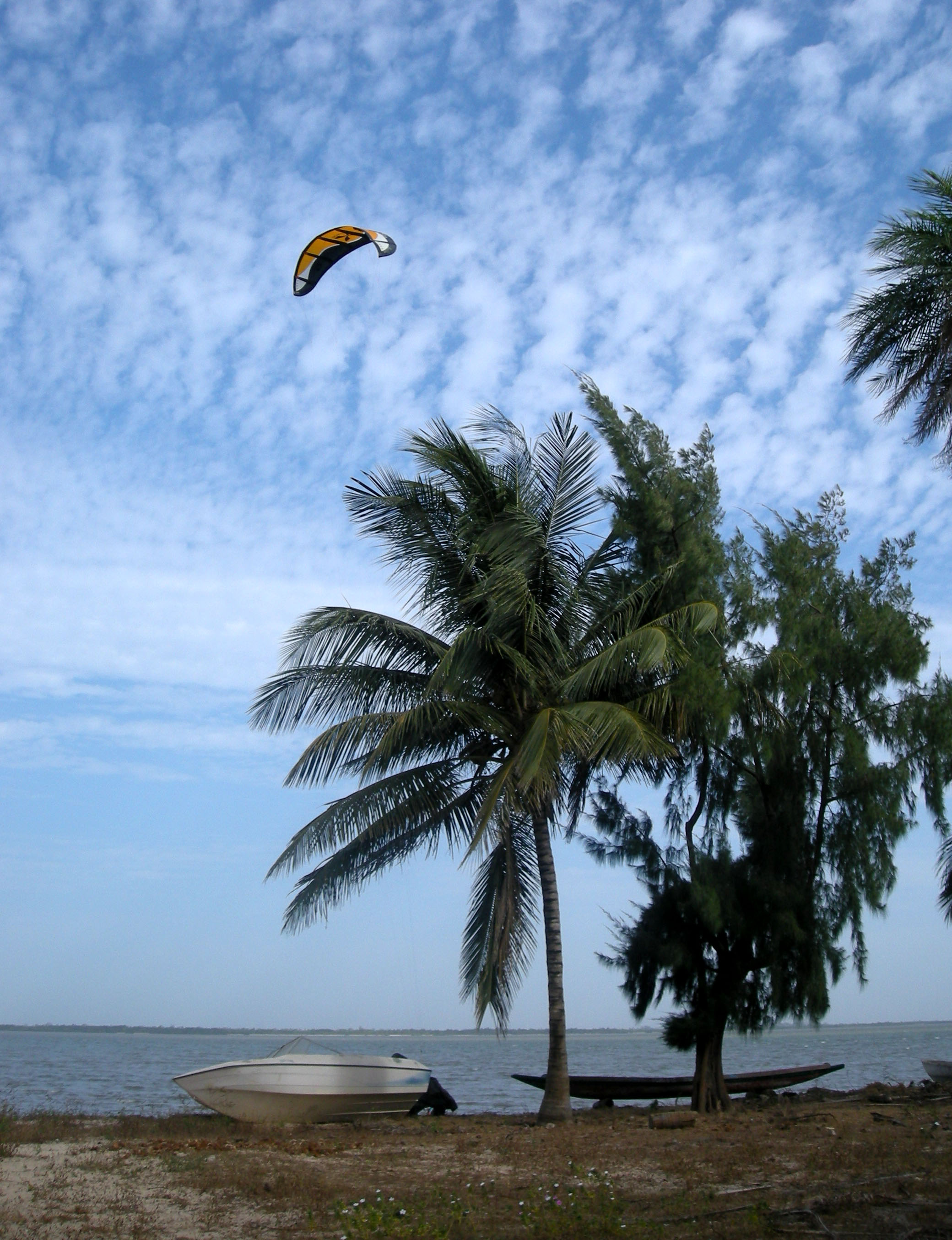 Kitesurf à Carabane (Casamance, Sénégal)